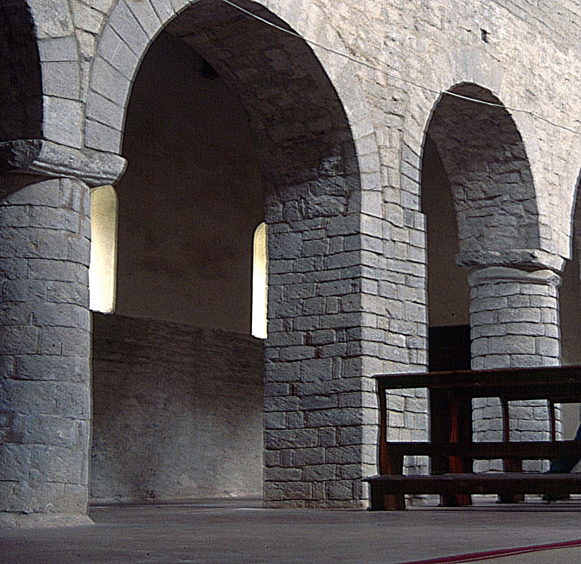 Abbazia di San Salvatore di Monte Corona